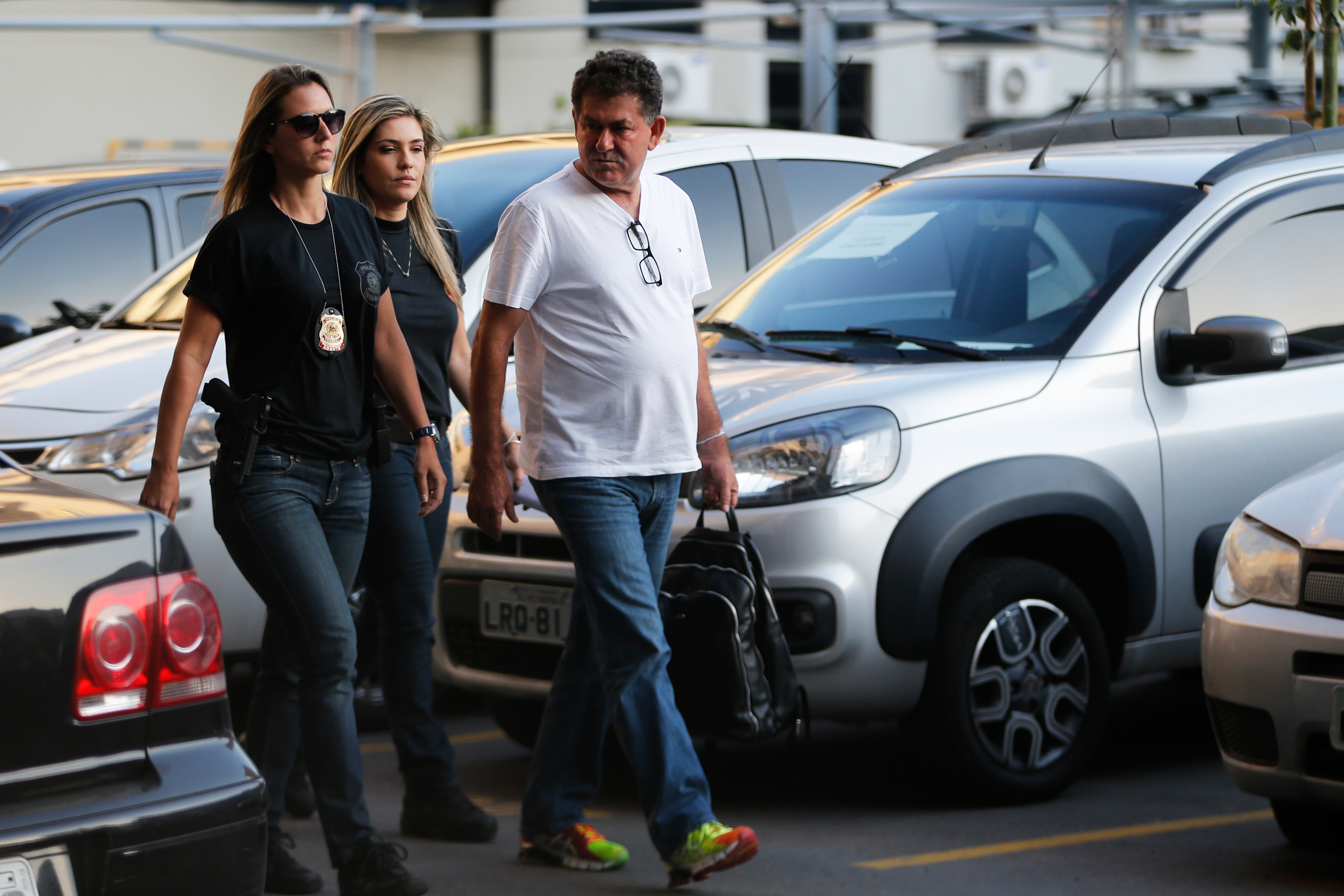 Rio de Janeiro - O deputado estadual Paulo Melo se entrega à Polícia Federal após ter prisão decretada pelo TRF (Fernando Frazão/Agência Brasil)